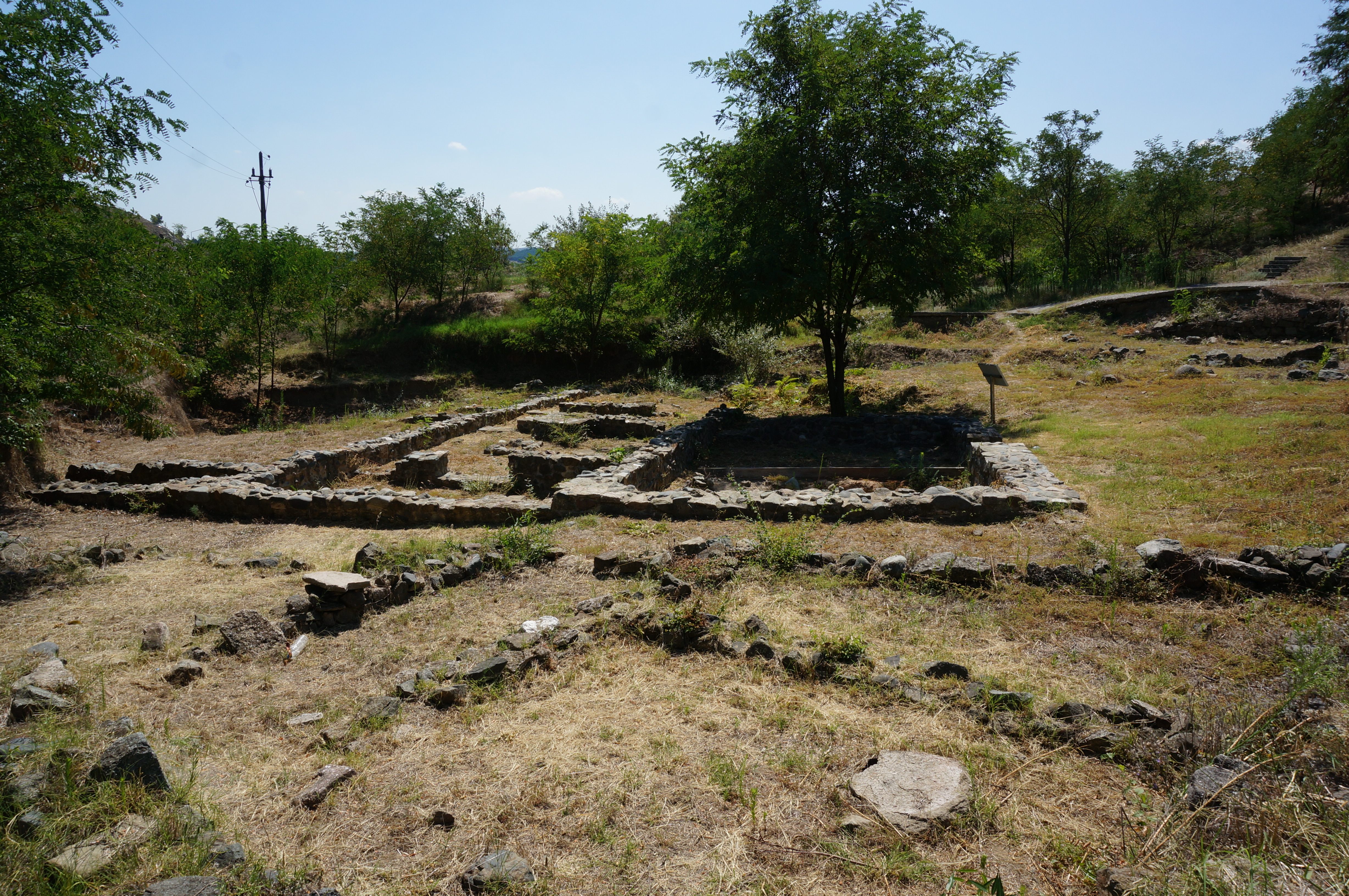 fouilles du forum Guevgueli .